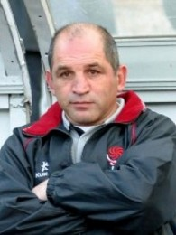 ジョージアのラグビーユニオン指導者